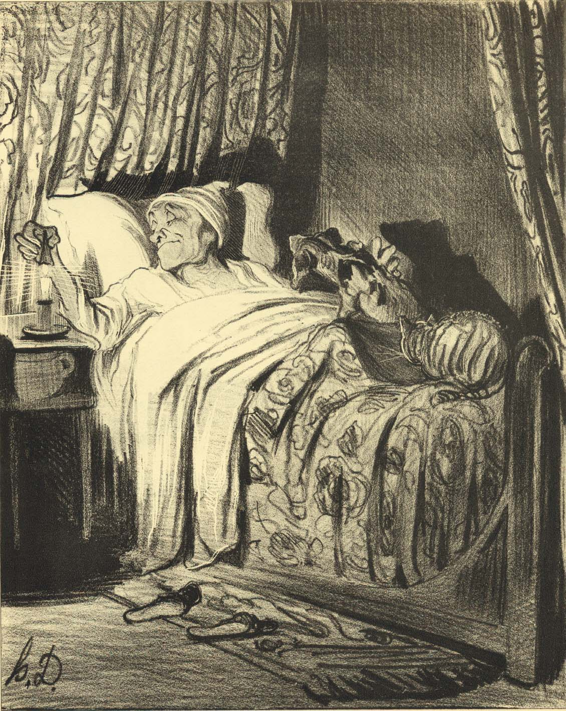 La journée du célibataire, Nr. 12. Neuf heures du soir.